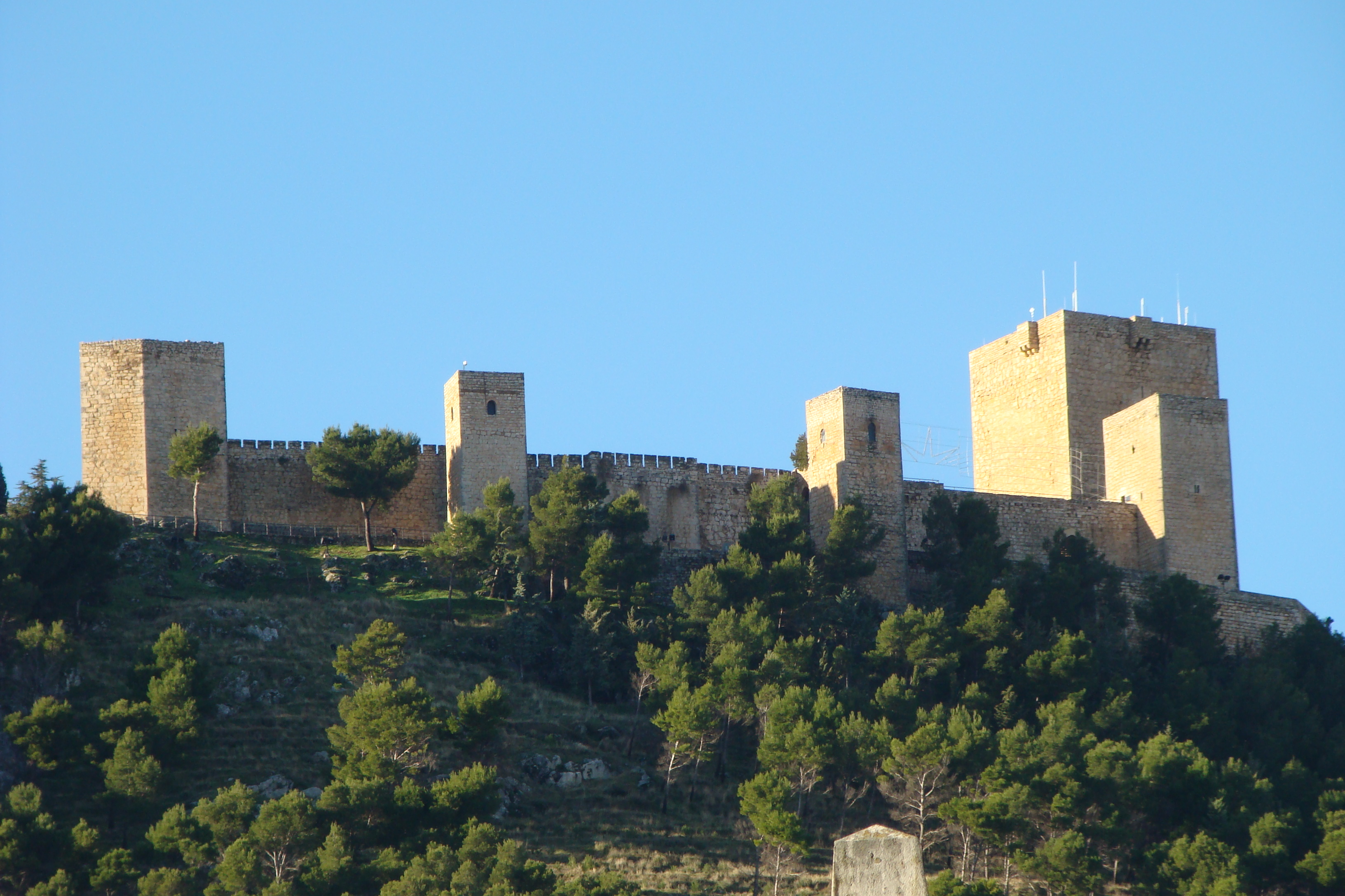 Vista del Castillo de Santa Catalina, en Jaén